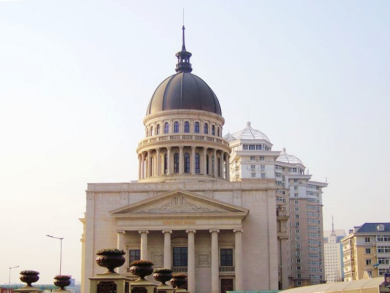 天津音乐厅